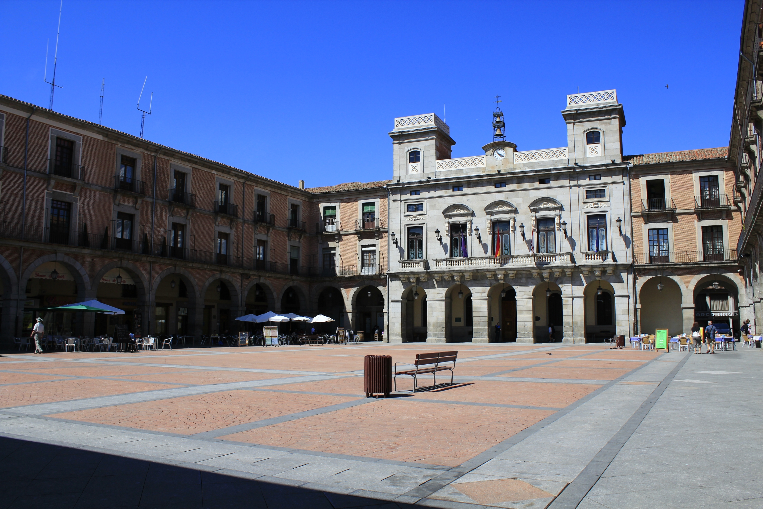 Plaza del Mercado Chico, ayuntamiento. Ávila, provincia de Ávila, Castilla y León, España.